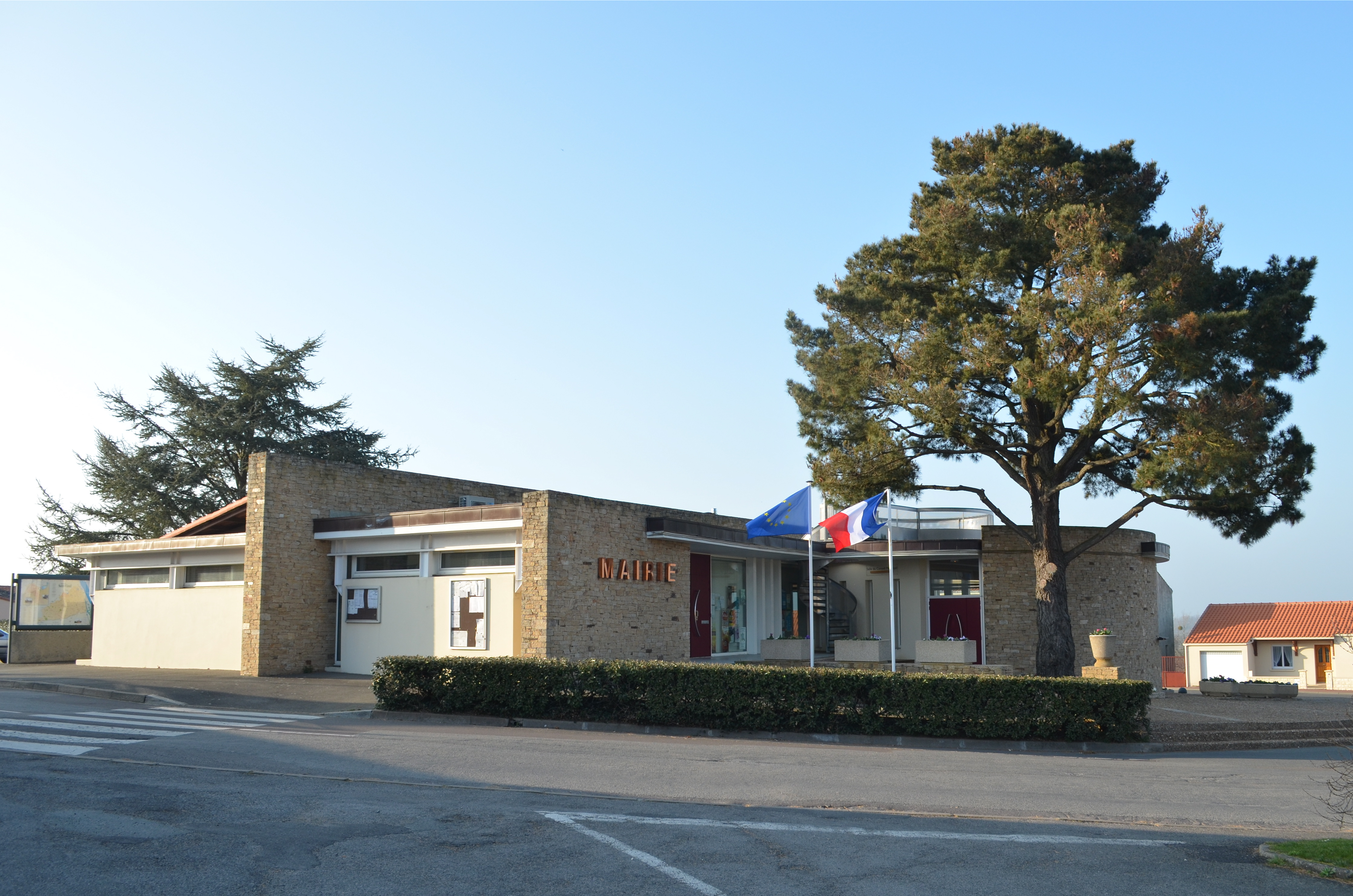 Mairie de Saint-Viaud - Loire-Atlantique